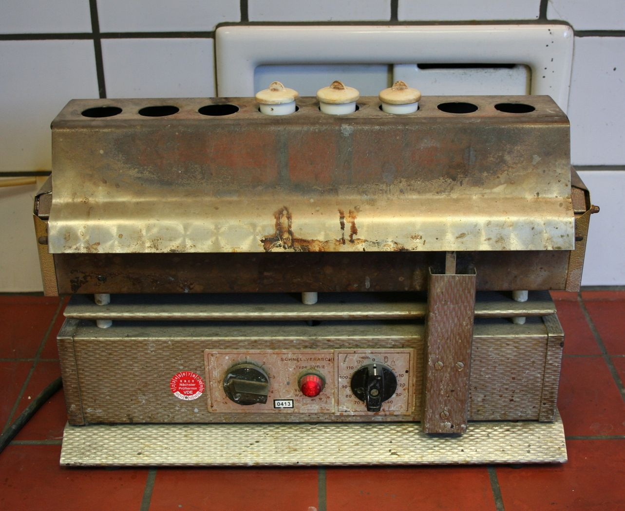 Schnellverascher